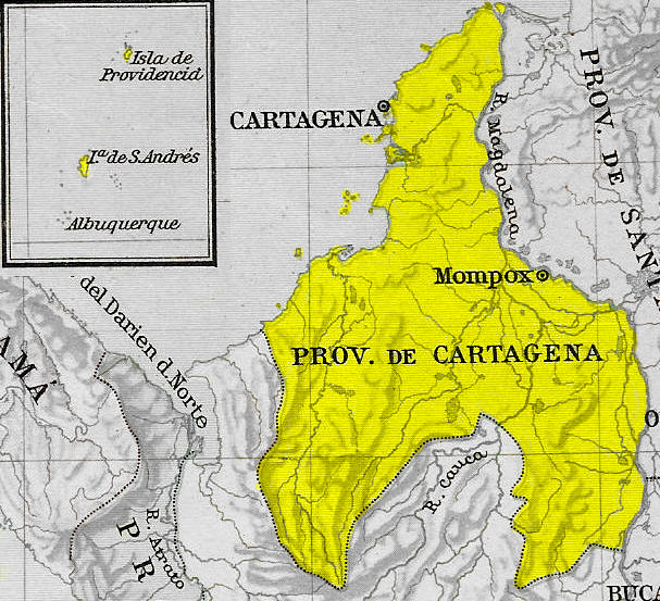 Mapa de la Provincia de Cartagena en 1810 y 1830